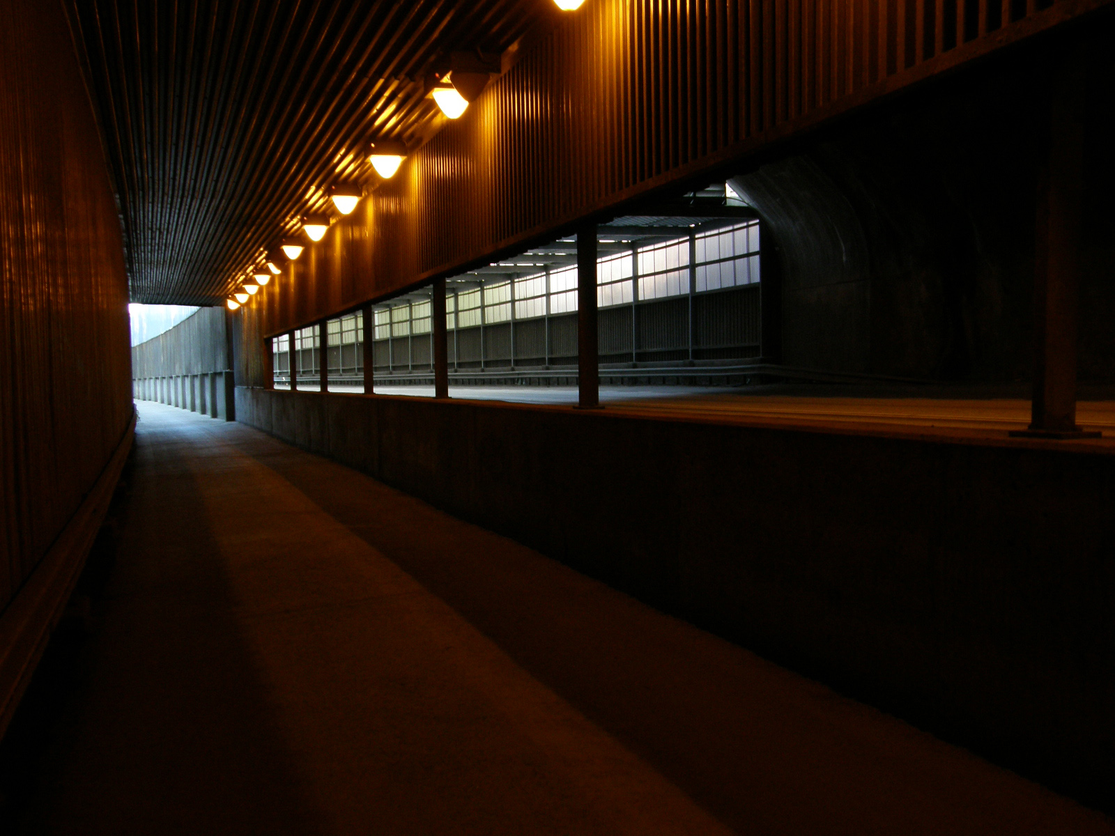 Gårdstenstunnelns mynning västerut mot Angeredsbron, sedd inifrån, från gång- och cykelbanan. Göteborg 2008